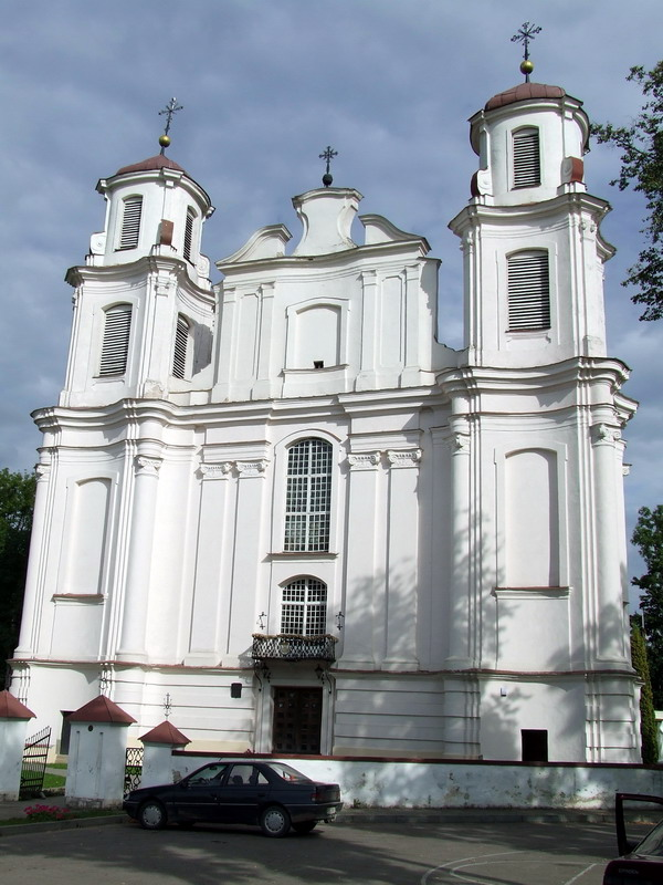 Šv. arkangelo Mykolo ir Jono Krikštytojo church, Jieznas, Lithuania.